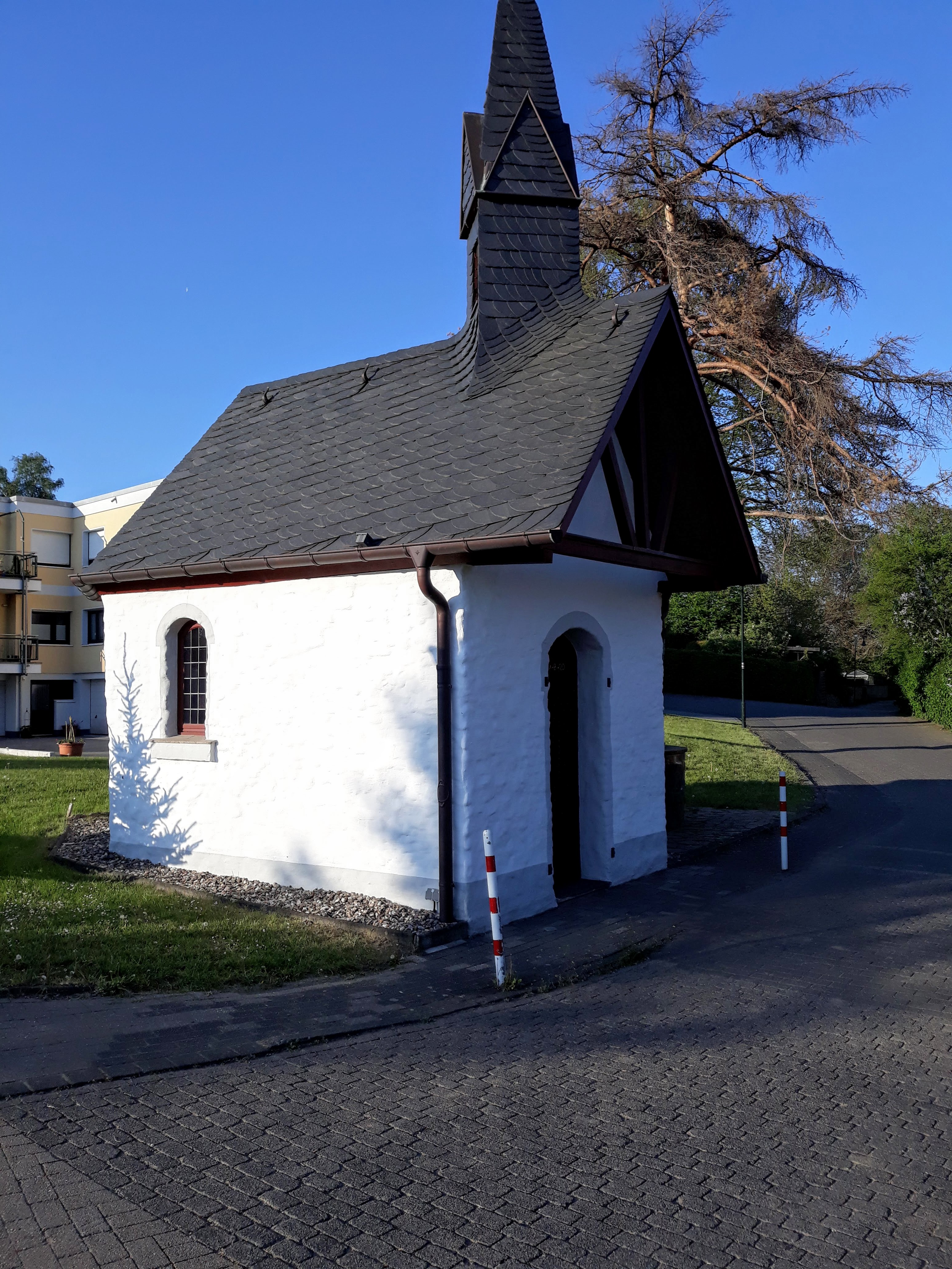 Maternus-Kapelle Schnappe